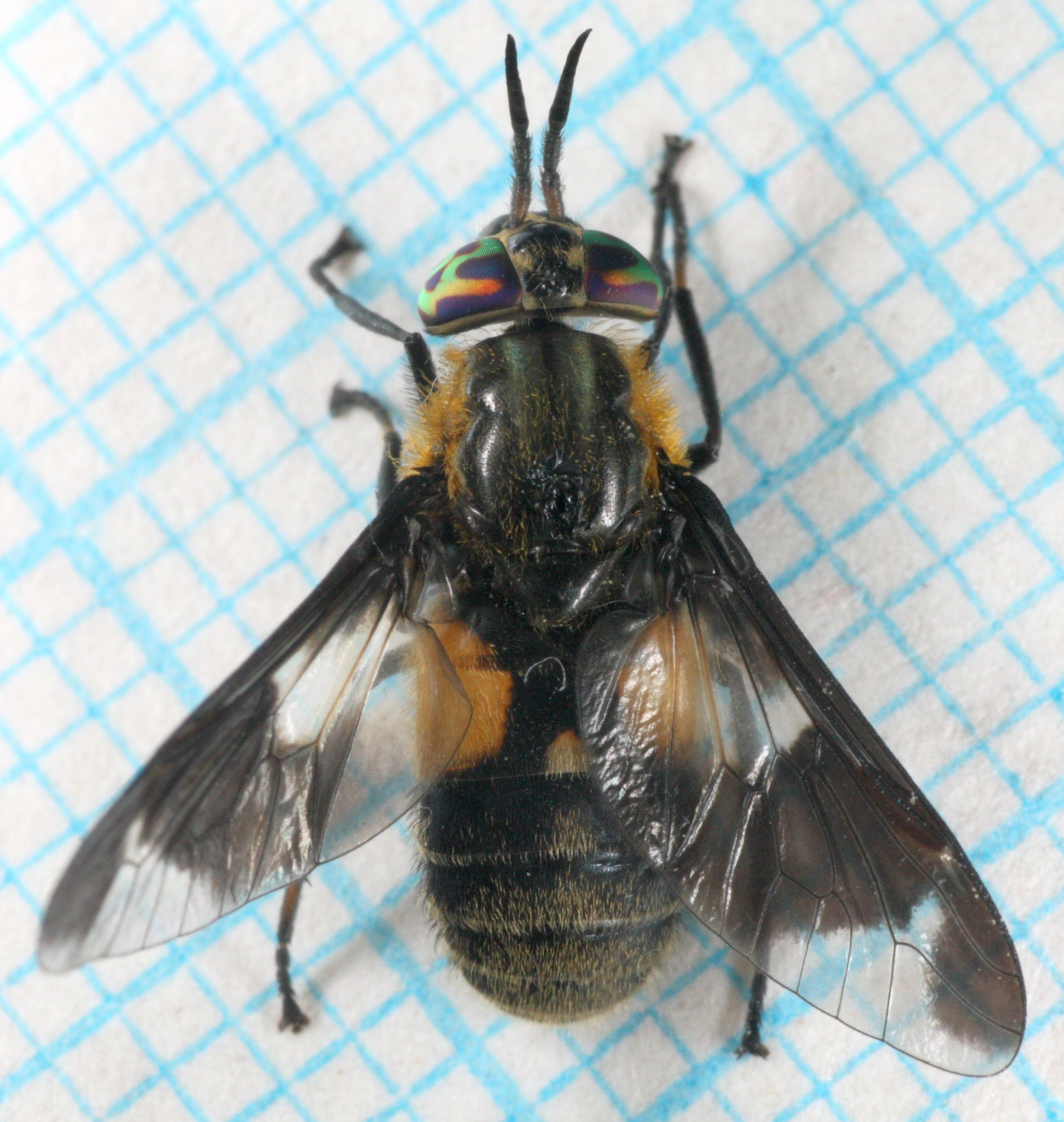 bredmerket blinding Chrysops caecutiens